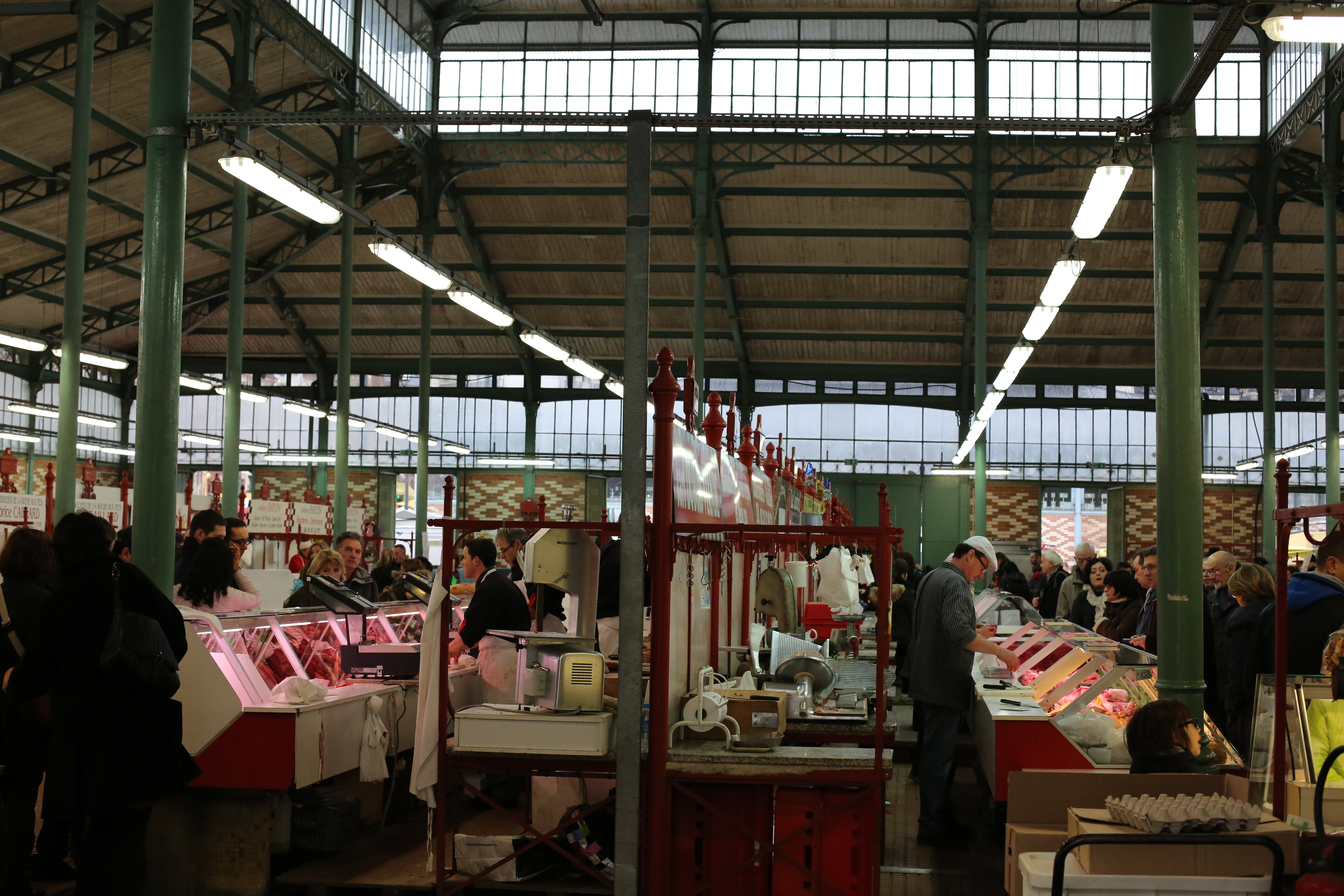 Le pavillon sud des Halles Martenot lors du marché du samedi 29 décembre 2012.